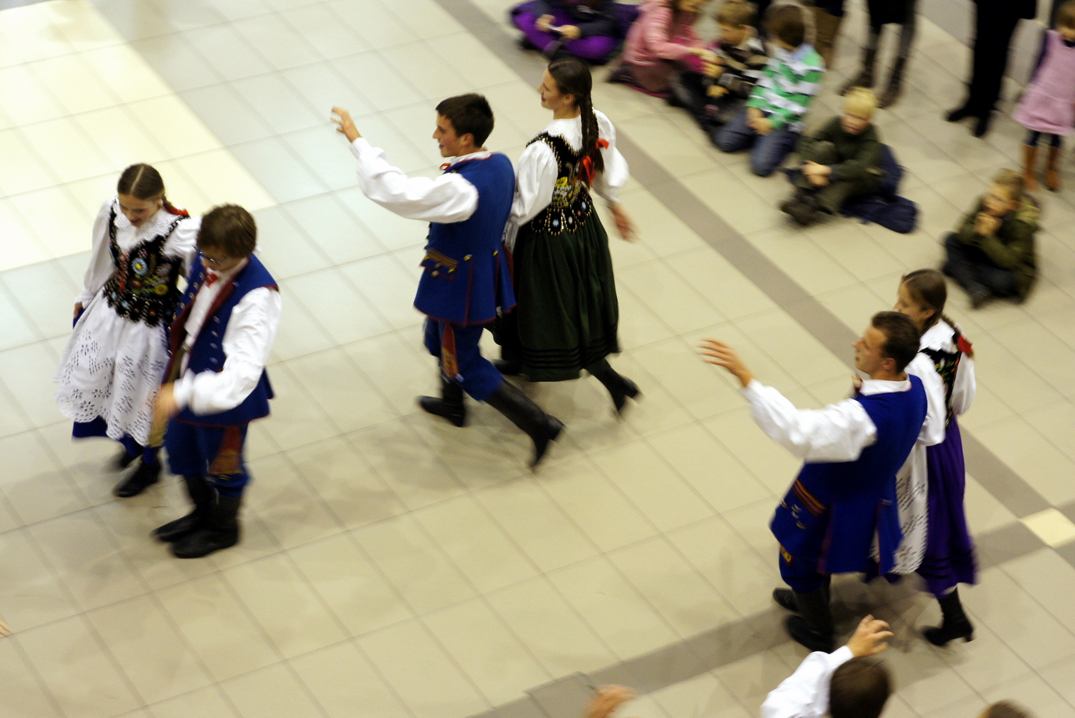 Tancerze w strojach rzeszowskich ( Zespół "Mali Gorzowiacy")